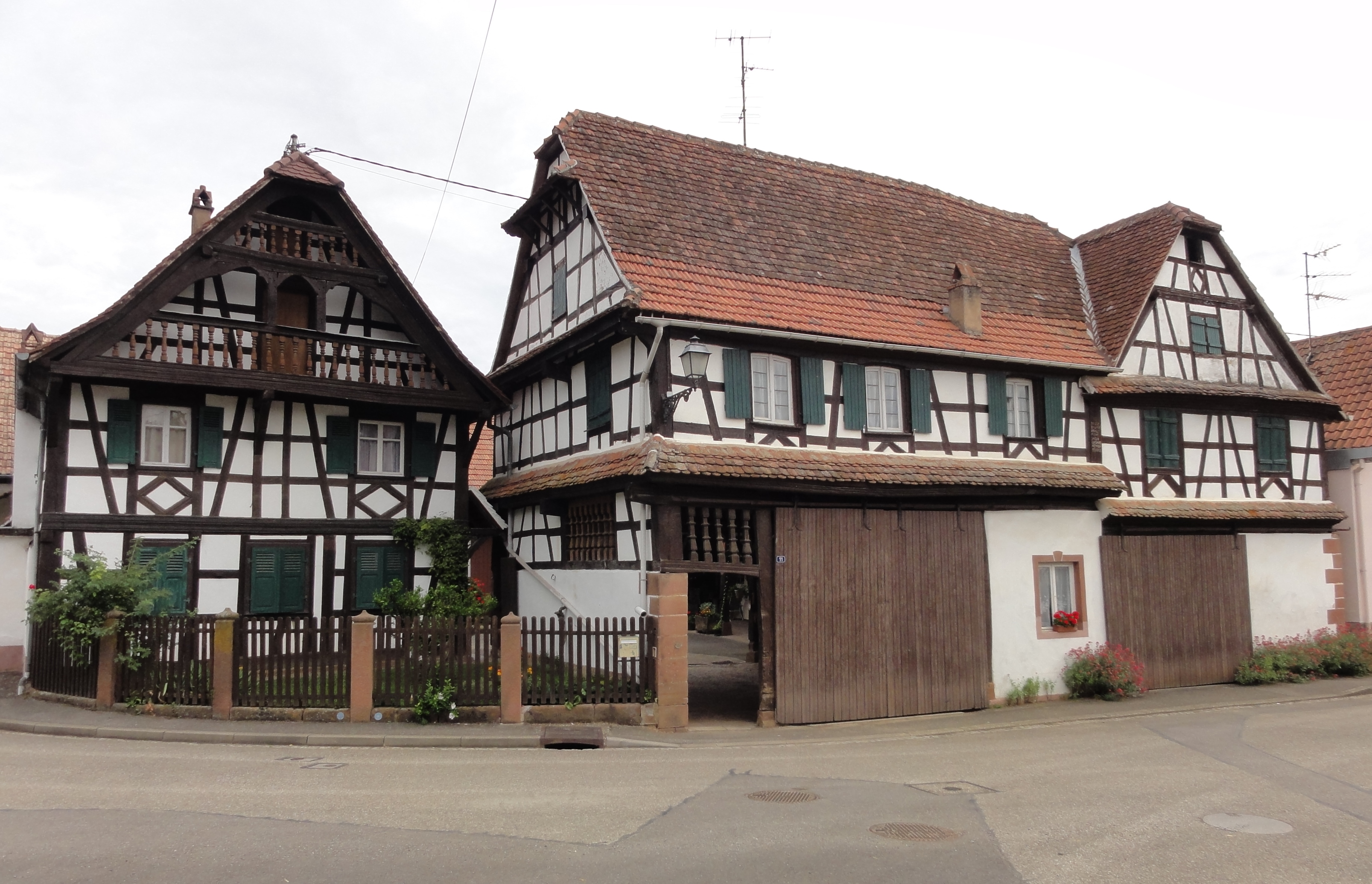 Alsace, Bas-Rhin, Zœbersdorf, Ferme (XVIIIe-XIXe), 11 rue Principale. .